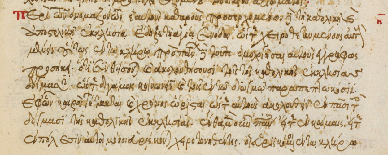 8 канон Никейского собора , посвященный кафарам. Рукопись 1600 года. Британская библиотека.